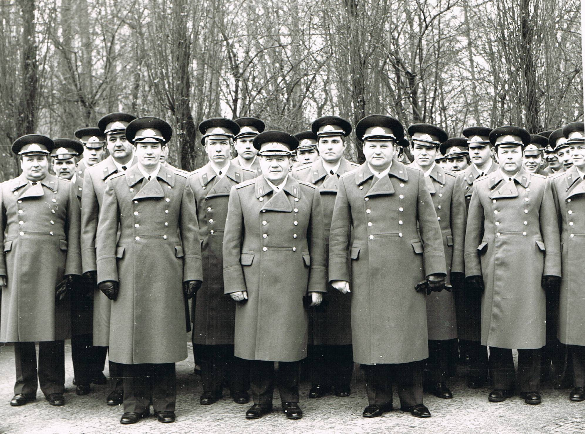 Генерал армии Шавров Иван Егорович, 1982 Берлин. На возложении венков у входа в Третов Парк с офицерами 6-й гв. ОМСБр.